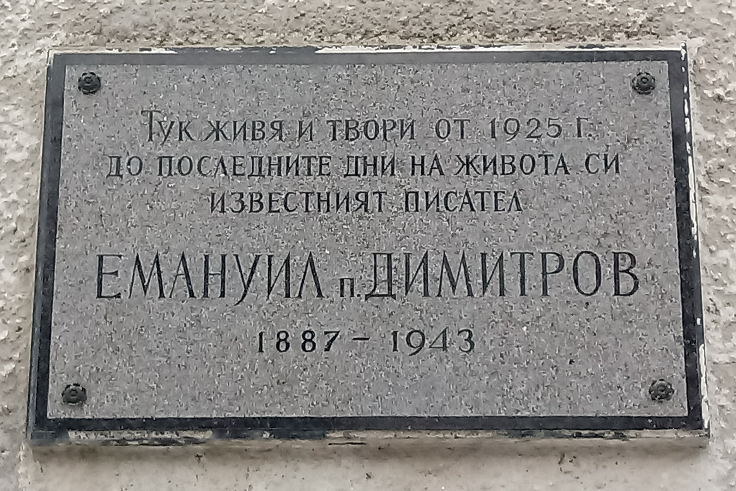 Emanuil Popdimitrov memorial plaque, 26 Avicenna Str., Sofia